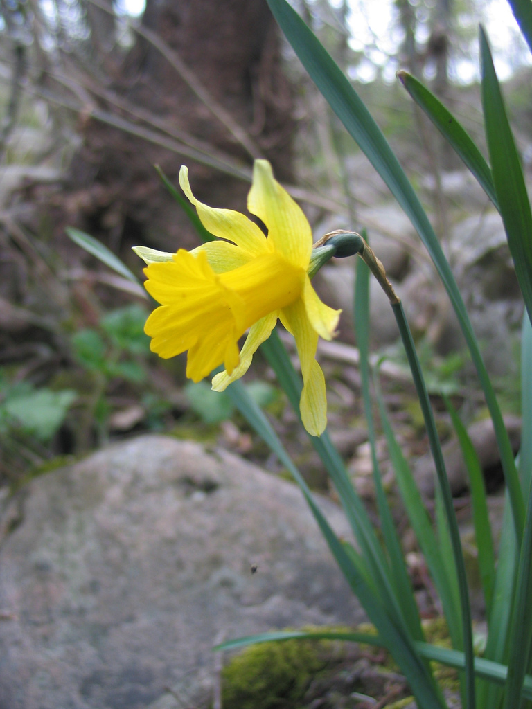 Narcissus asturiensis. Sierra de la Peña de Francia, Salamanca, España. (Original: 461916175_ab48828065_b.jpg)